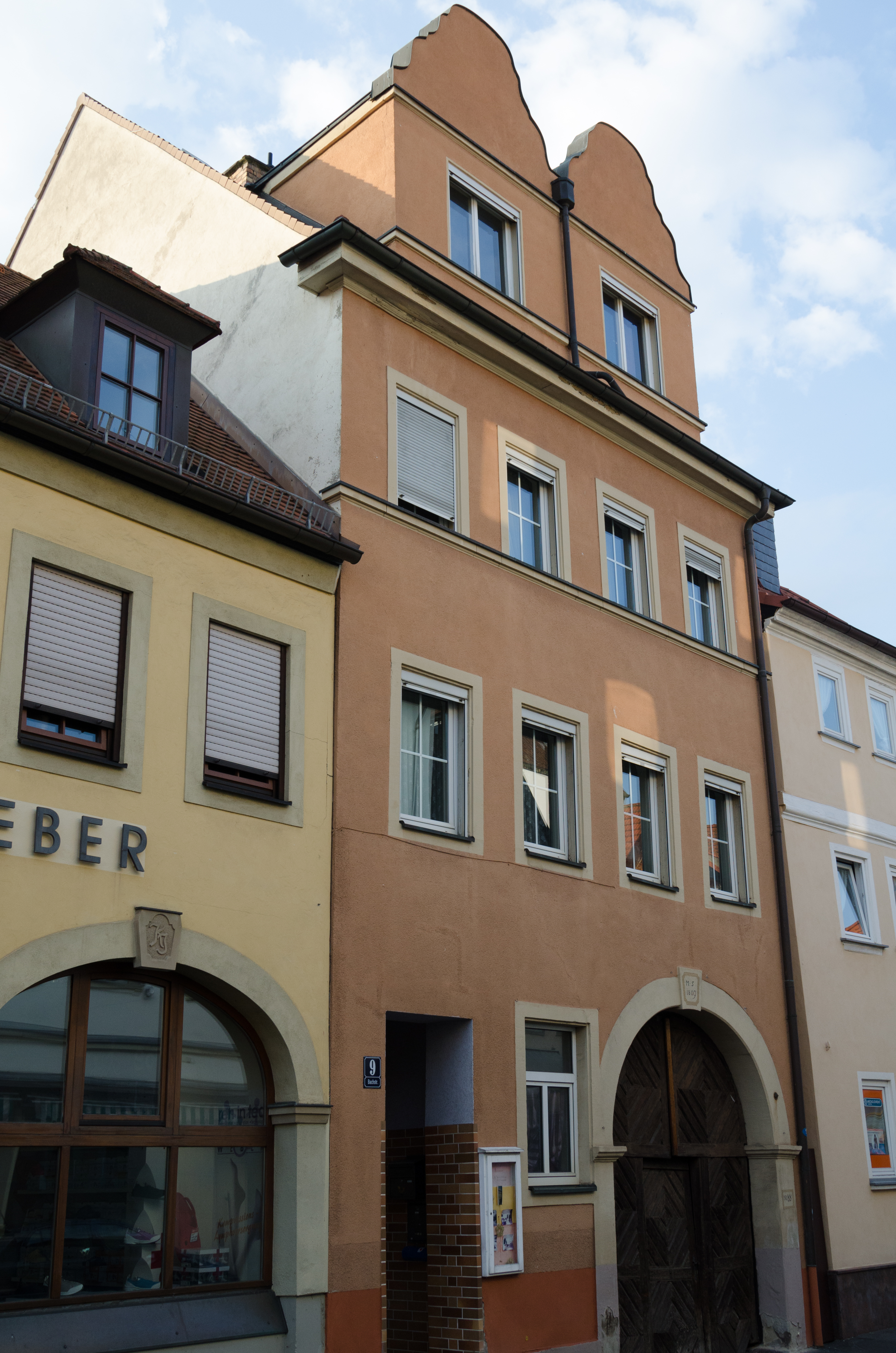 Bad Kissingen, Bachgasse 9